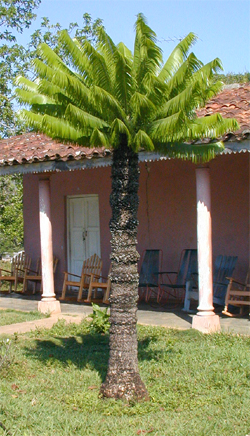 Microcyas calocoma en el pueblo de Viñales, Pinar del Río, Cuba. Con hojas nuevas. Foto impresa escaneada, versión encuadrada y resolución reducida.